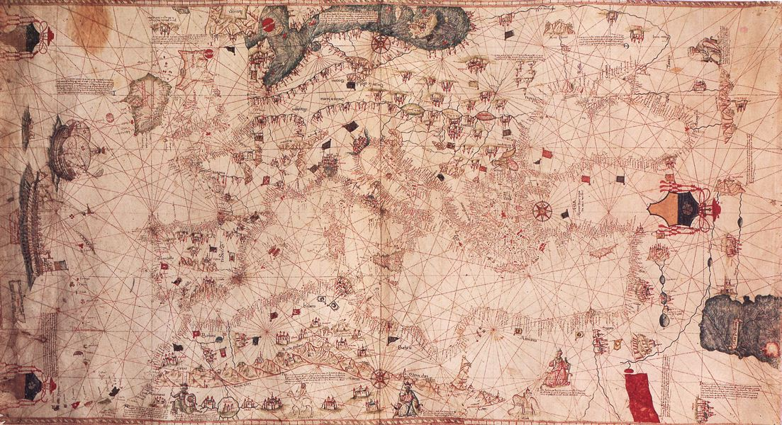 1482. Grazioso Benincasa. Biblioteca Universitaria, Bolonia